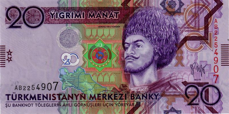 20 manat. Türkmenistan